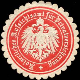 Sealing stamp Title: Kaiserliches Aufsichtsamt für Privatversicherung Description: rot, weiss, geprägt Place: size: 4 cm